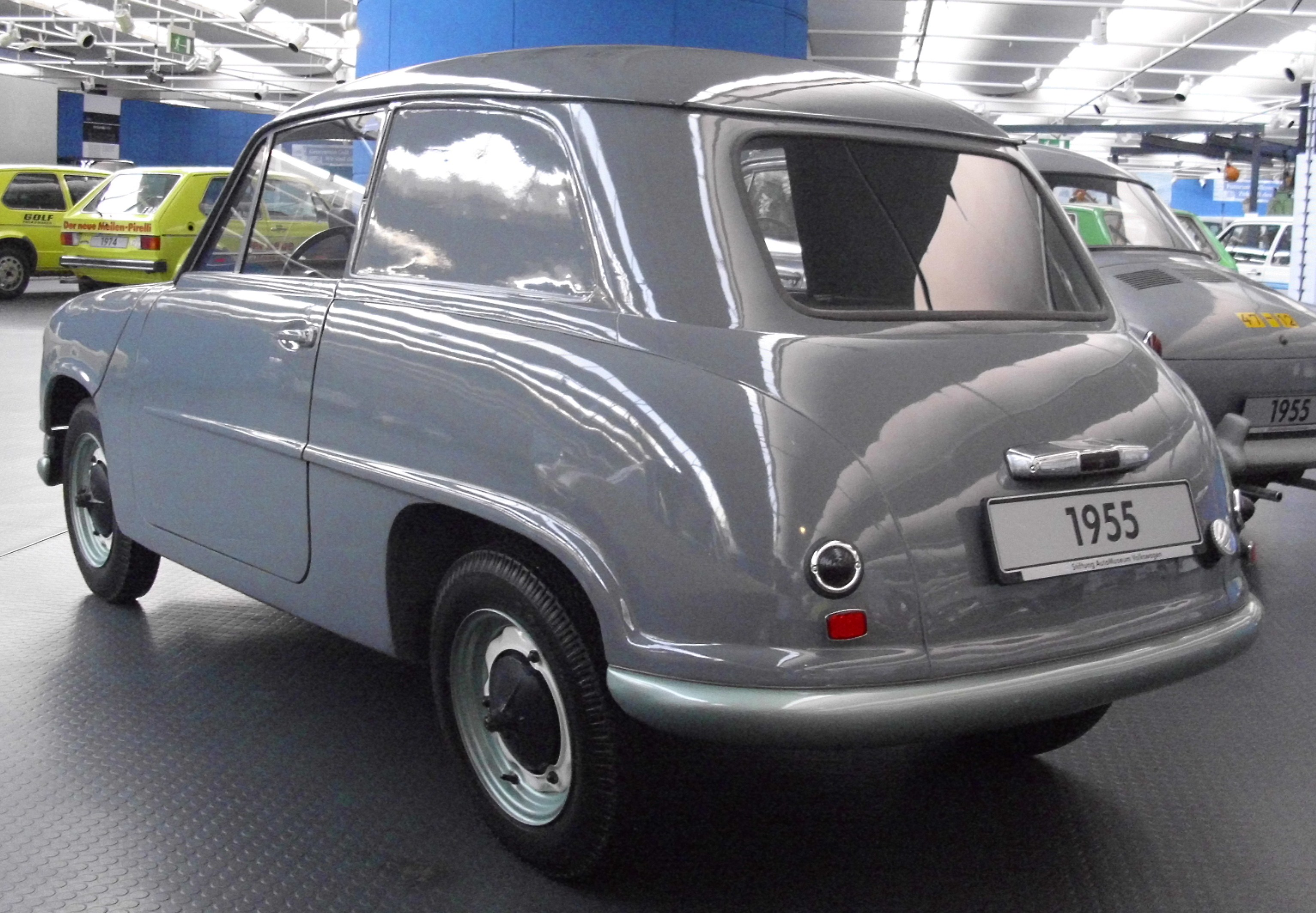 VW EA 48 Prototyp von 1955 im Automuseum Volkswagen in Wolfsburg, Deutschland.